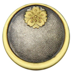 日輪に桜の徽章を撮影